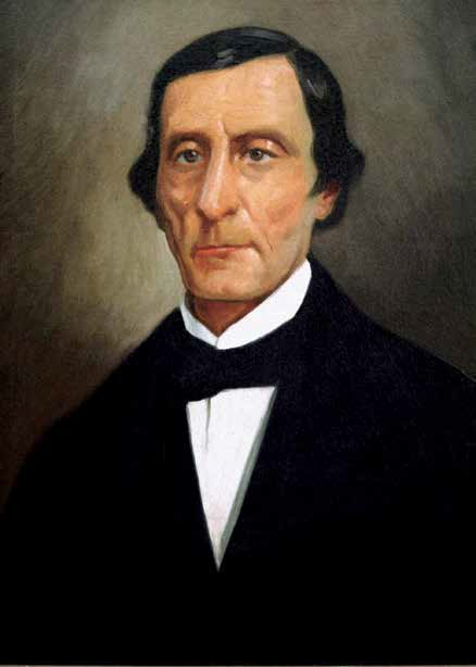 Manuel Bartolomé Ferreyros de la Mata ( 1793 - 1872) político, diplomático y escritor peruano. Fue tres veces ministro de Relaciones Exteriores en diversos gobiernos (1835, 1839-41 y 1849-51), Ministro de Hacienda (1838 y 1839-41) y ejerció numerosos cargos diplomáticos.